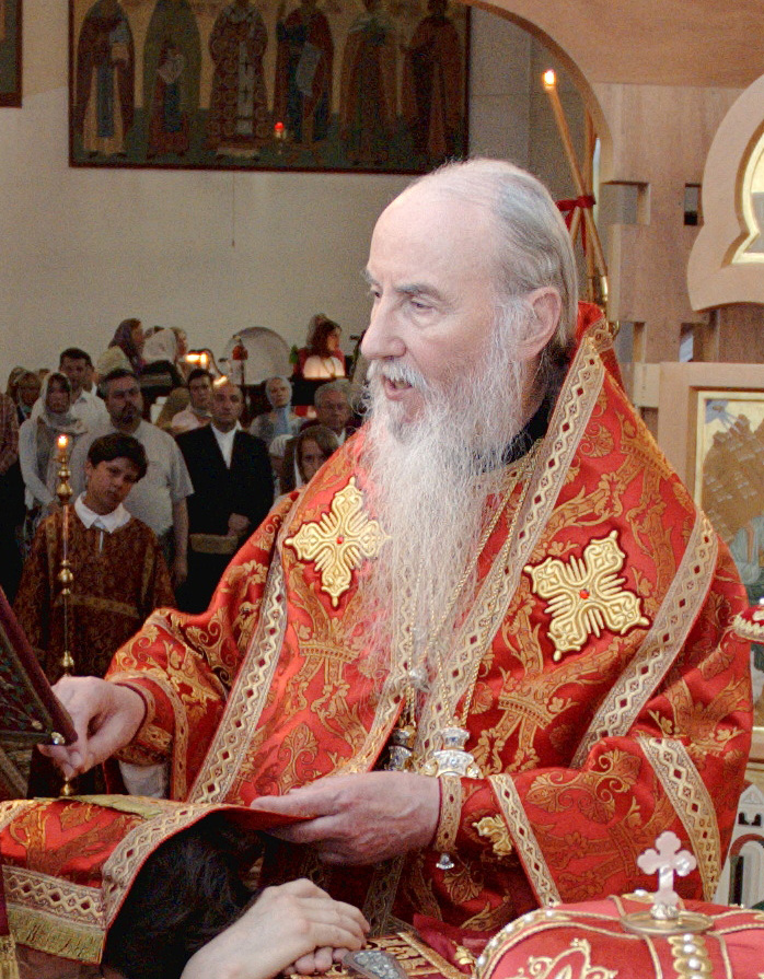 Архиепископ Берлинский и Германский рукополагает Антония Одайского во диакона